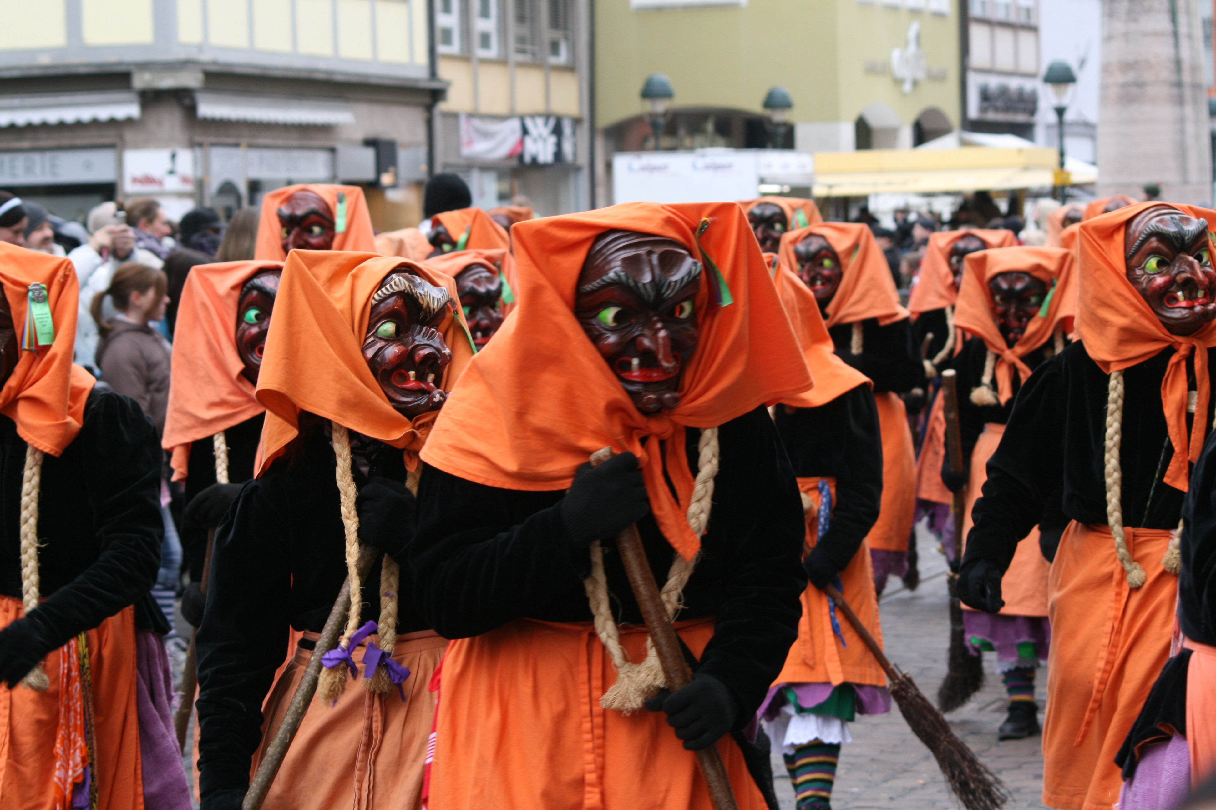 Narrensprung in Freiburg i. Br. 2009: Ravensburger Schwarze Veri Zunft, Figur: Hexenliesel vom Pfanennstiel